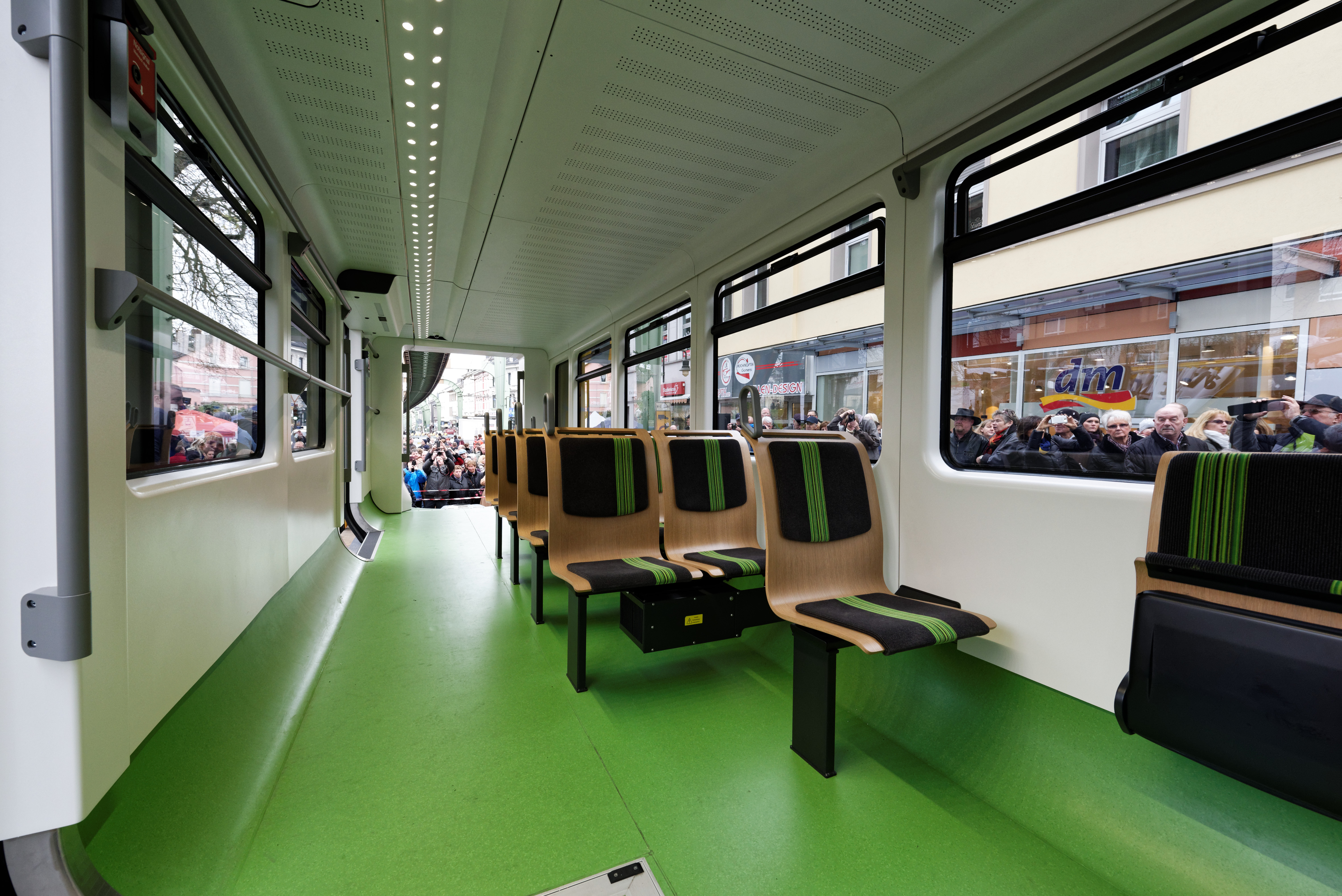 neue Schwebebahn von innen in Wuppertal